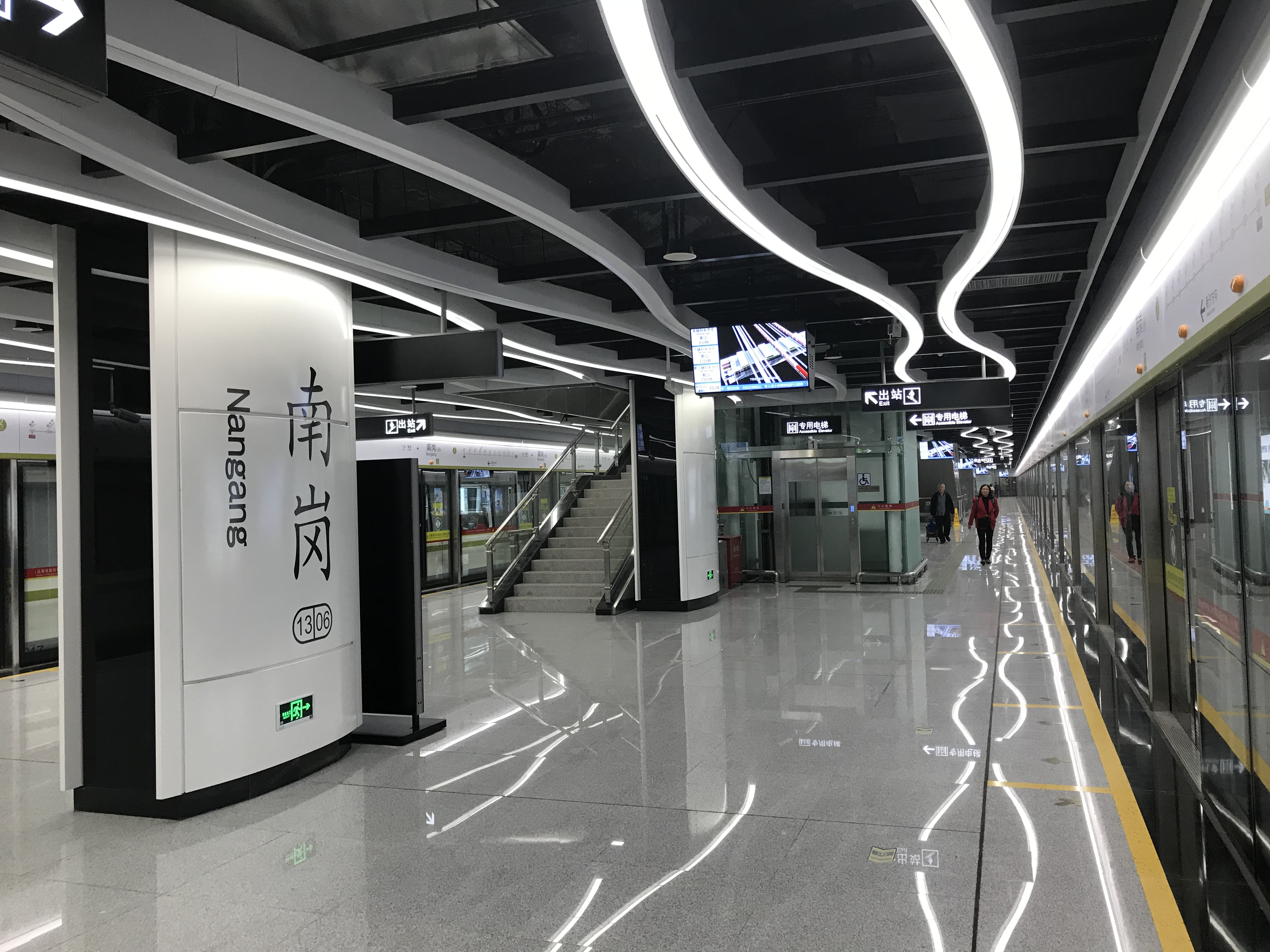 广州地铁南岗站